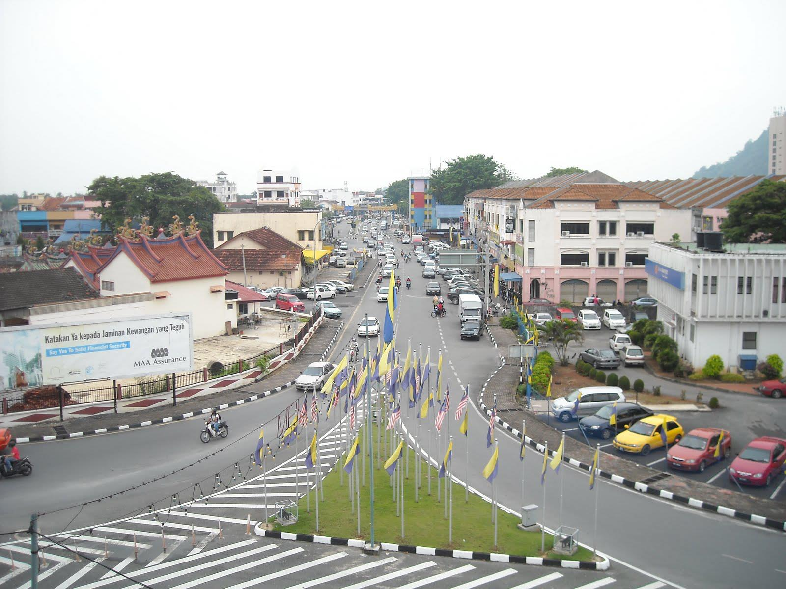 pemandangan Kangar dari atas